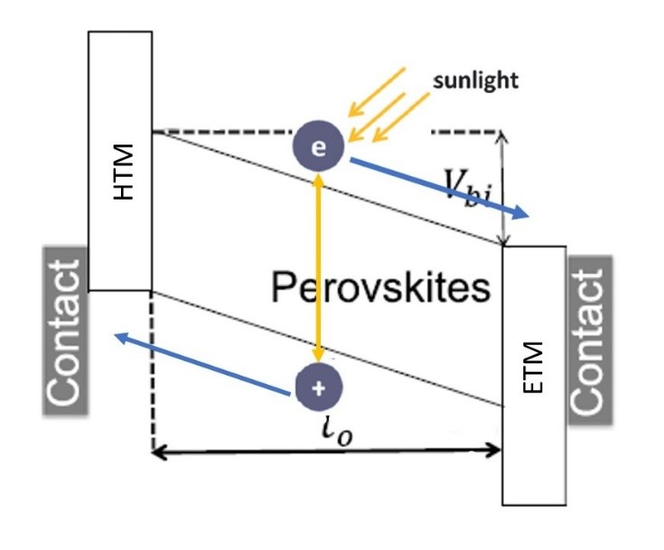 Generazione e trasporto di cariche in giunzioni p-i-n